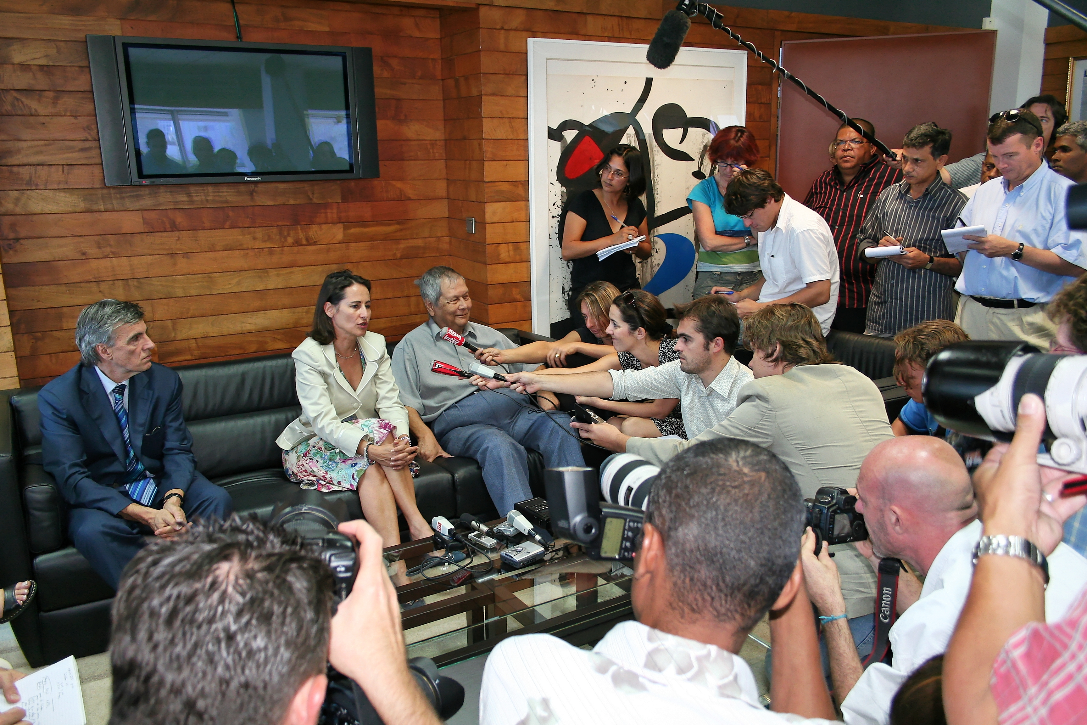 Ségolène Royal interrogée par les médias à La Réunion.